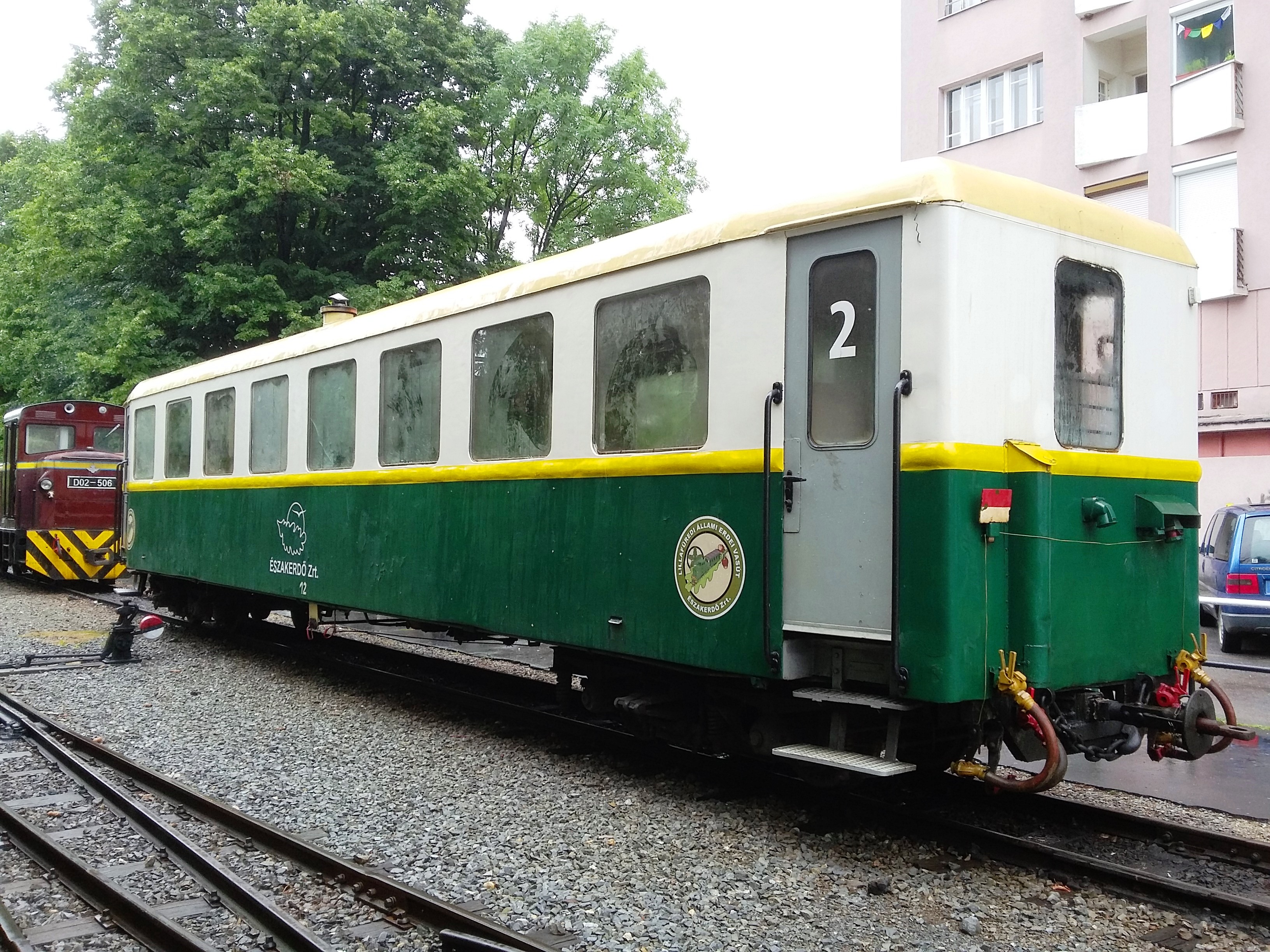 LÁEV zárt Bax kocsi